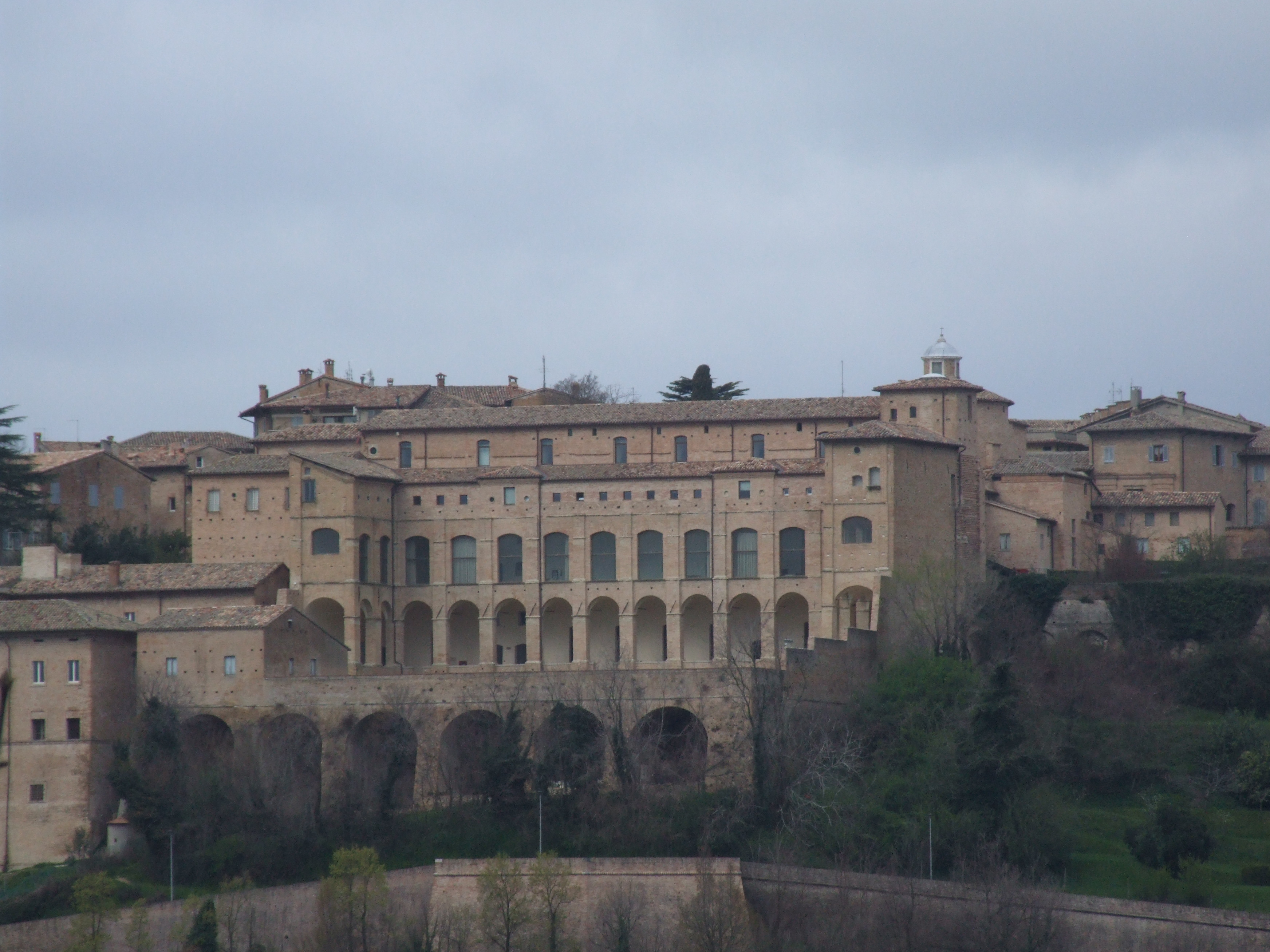 ex Convento di Santa Chiara This is a photo of a monument which is part of cultural heritage of Italy.